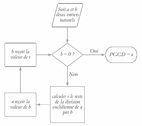 Algorithme d'Euclide pour le calcul du pgcd de deux entiers naturels